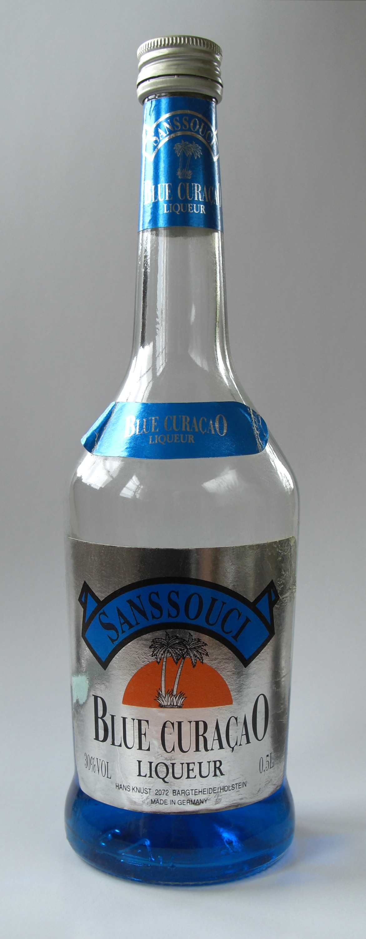 See title